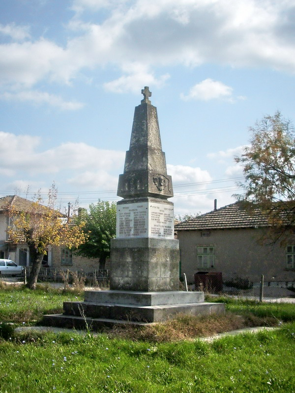 Паметникът на загиналите войници във войните от село Дриново, община Попово.